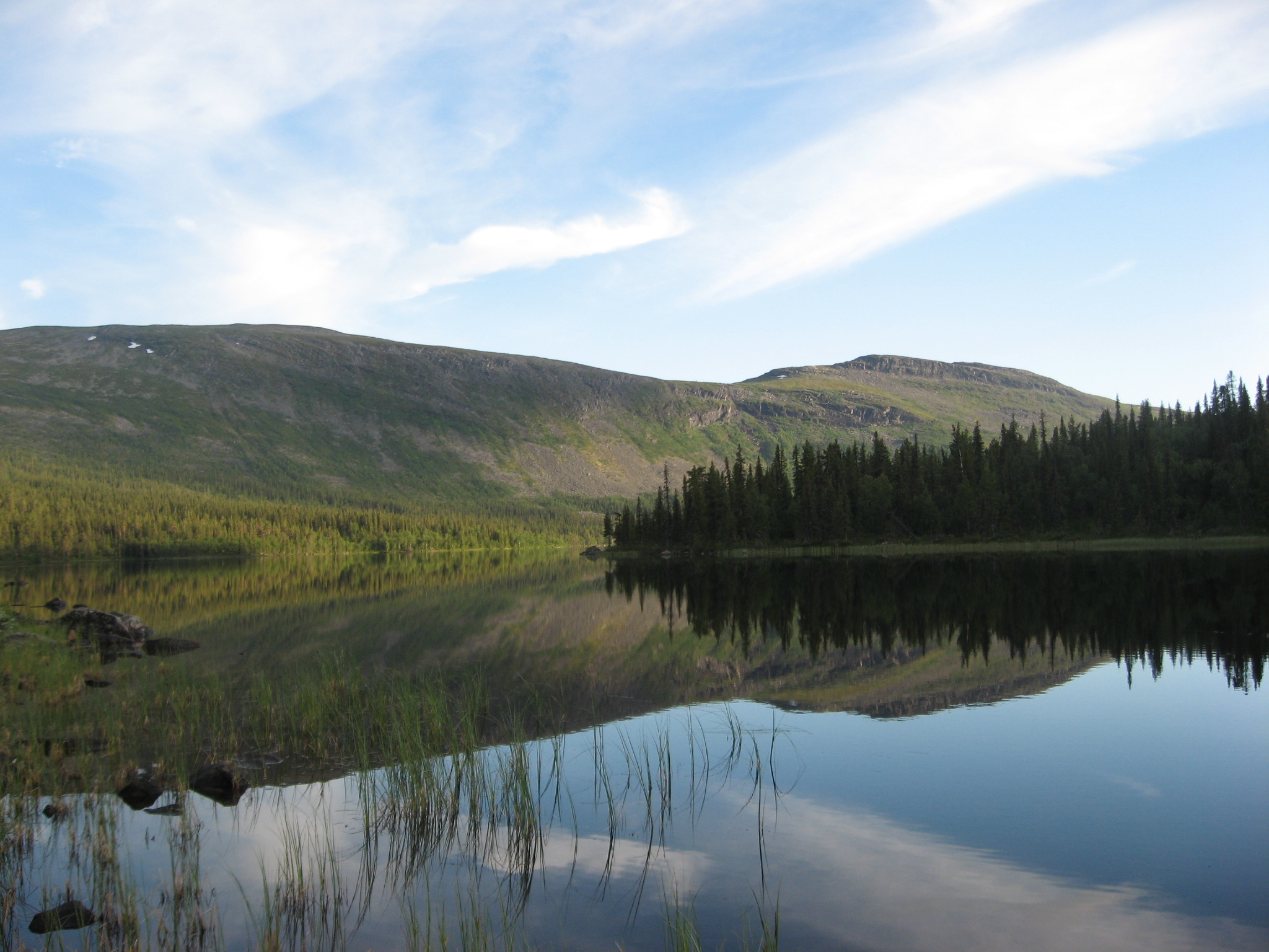 Lac de Pårte (sur la Kungsleden) en Laponie (Suède)